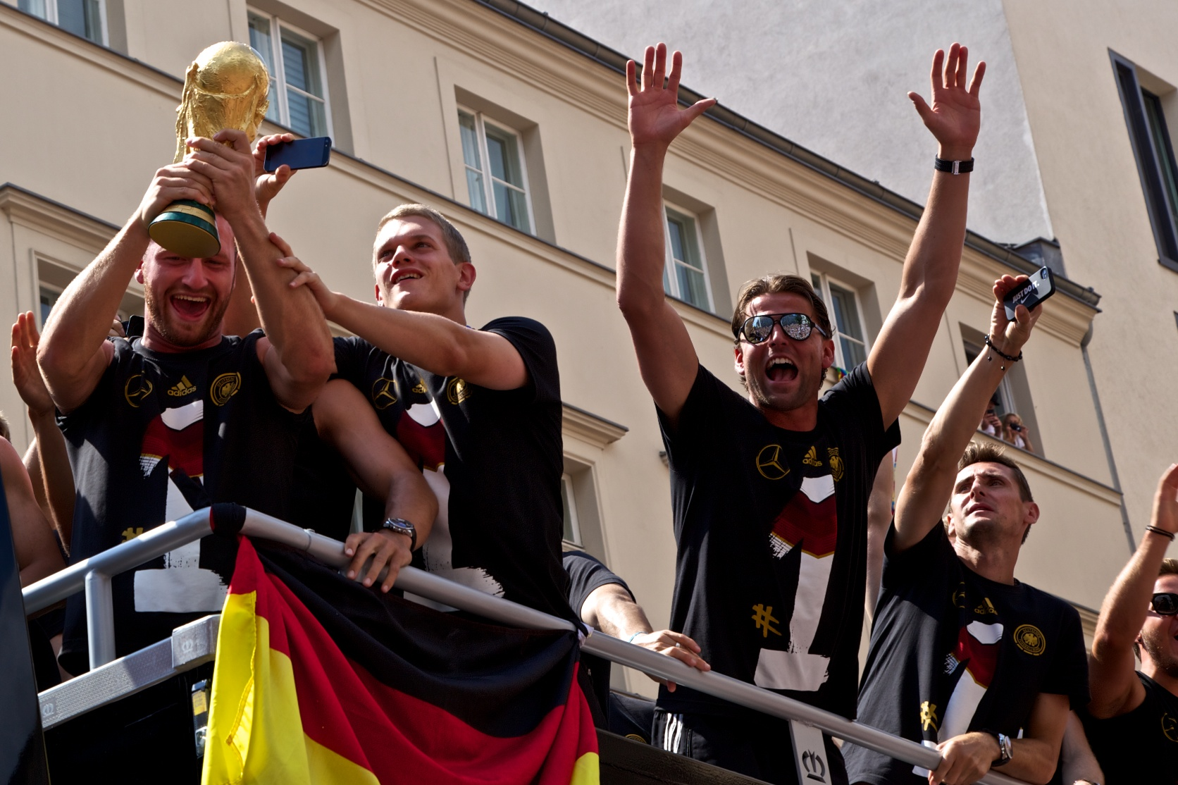 Shkodran Mustafi mit Weltmeister-Pokal